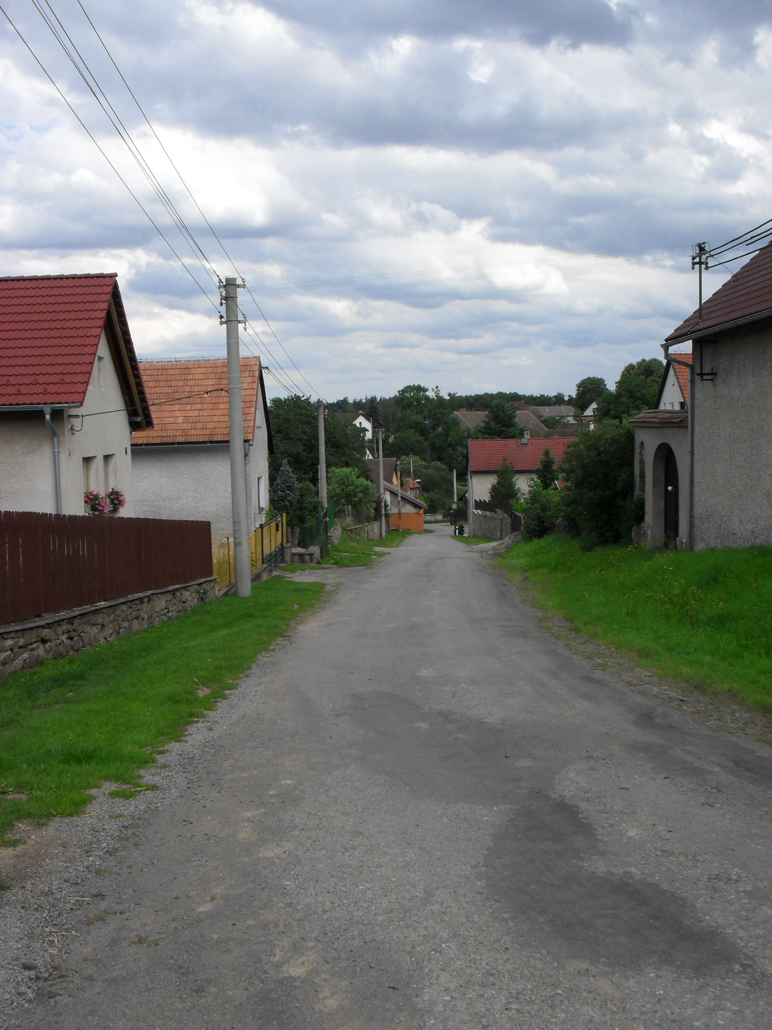 Pohled na benešovskou část Bukovou Lhotu